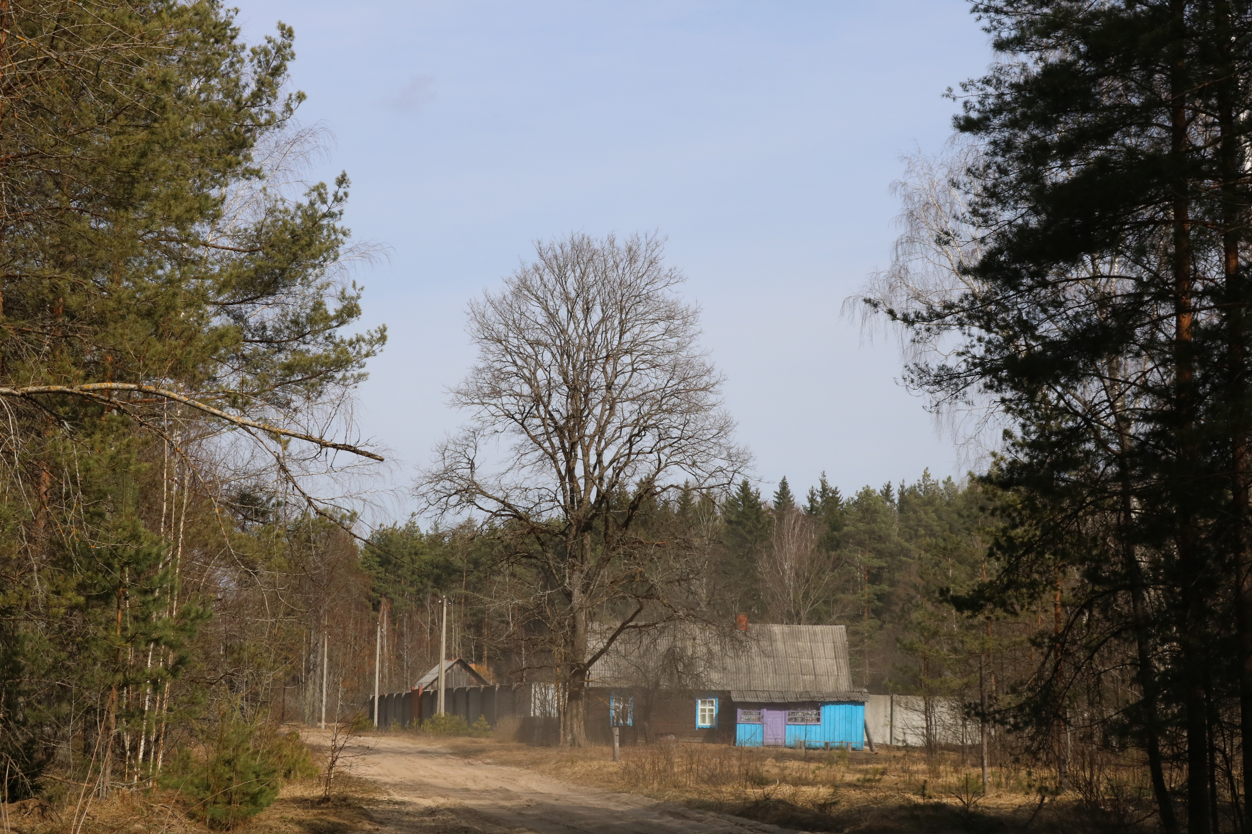 Wieś Ubołocie (biał. Убалаць), stan obecny. Fot. Alena Liaszkiewicz (2019)